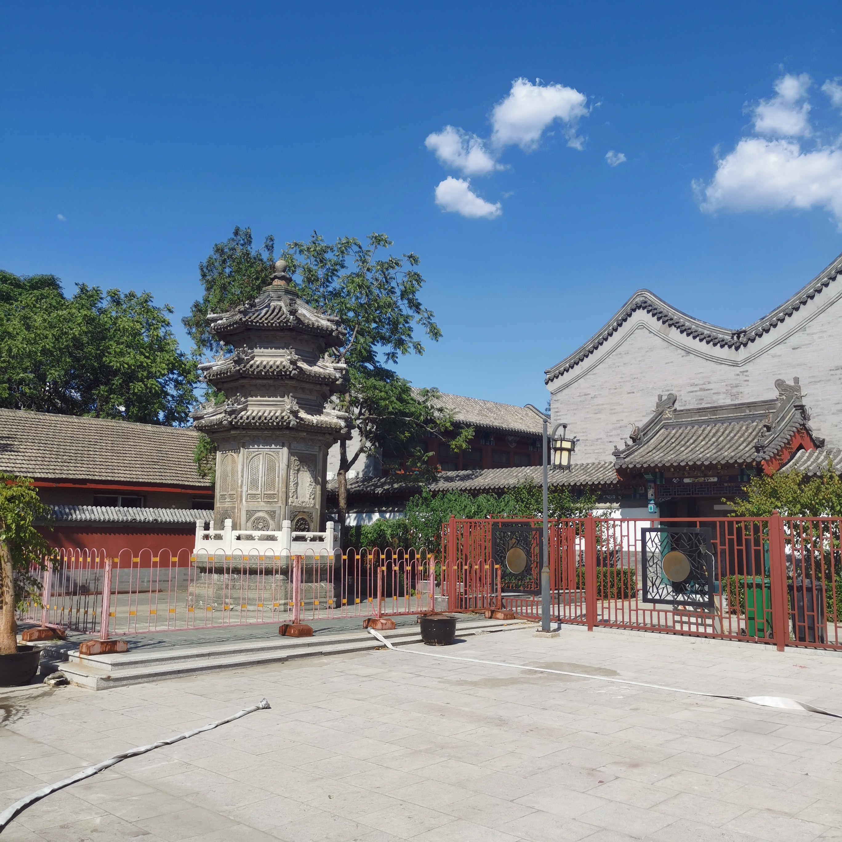 中文（中国大陆）: 位于北京zh:白云观的罗公塔